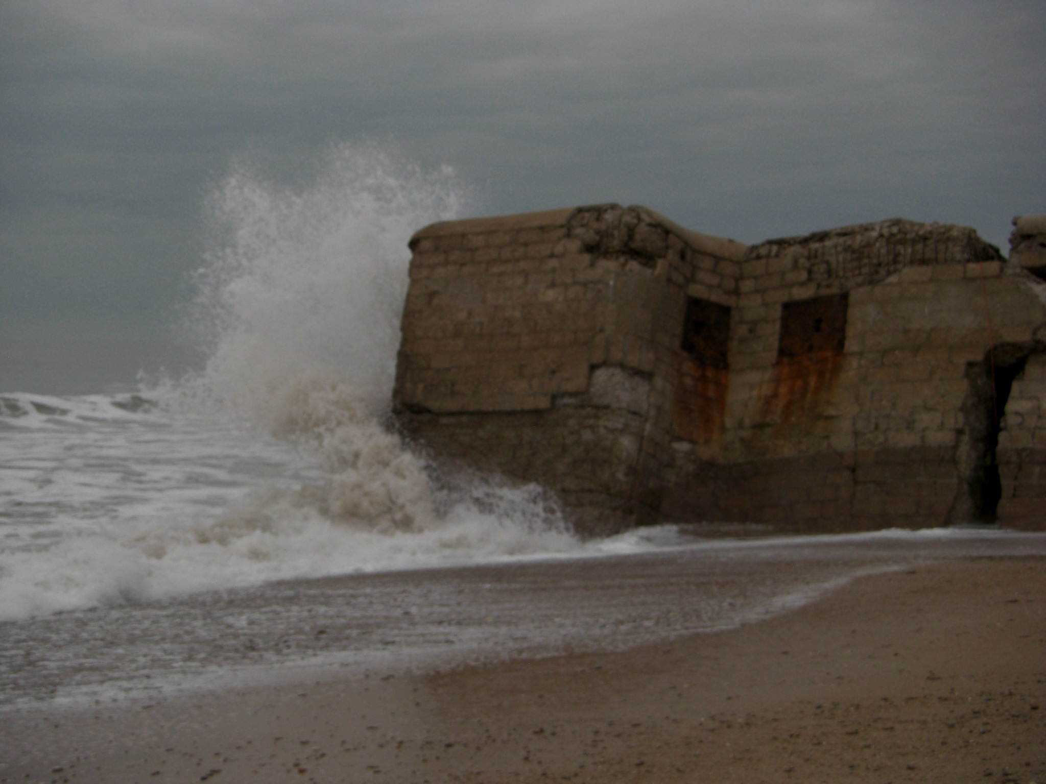 Fotografia del bunker numero 1 tomada en la playa de Camposoto hacia el norte.